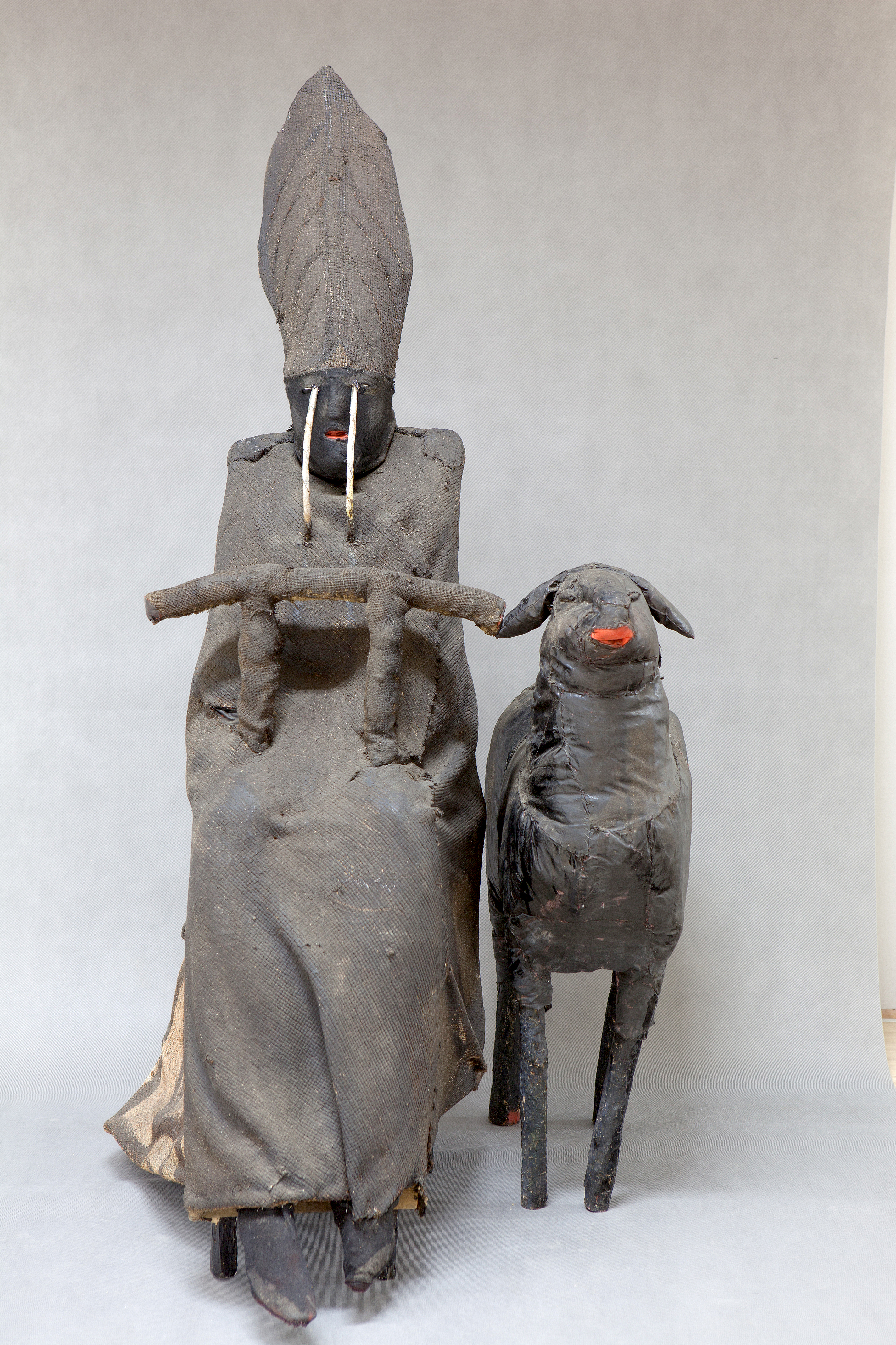 Czarny papież i czarna owca to jedno z najważniejszych wczesnych dzieł artysty. Naturalnych rozmiarów postaci człowieka-papieża towarzyszy owca. Papież płacze, z jego oczu symbolicznie tryskają strumienie wody. Artysta nawiązał w tym przedstawieniu do przepowiedni Nostradamusa, a także do miejskich legend, wizji i apokaliptycznych przepowiedni, łączących powołanie czarnoskórego kardynała na tron papieski z końcem świata. Praca oddaje stan ducha drugiej połowy lat 80.: niepokoju, napięć, ale i wiary w nadchodzący przełom, który wstrząśnie posadami świata. Rzeźba była prezentowana na ostatnim Biennale w Wenecji w 2013 w głównej sekcji zatytułowanej Pałac Encyklopedyczny.